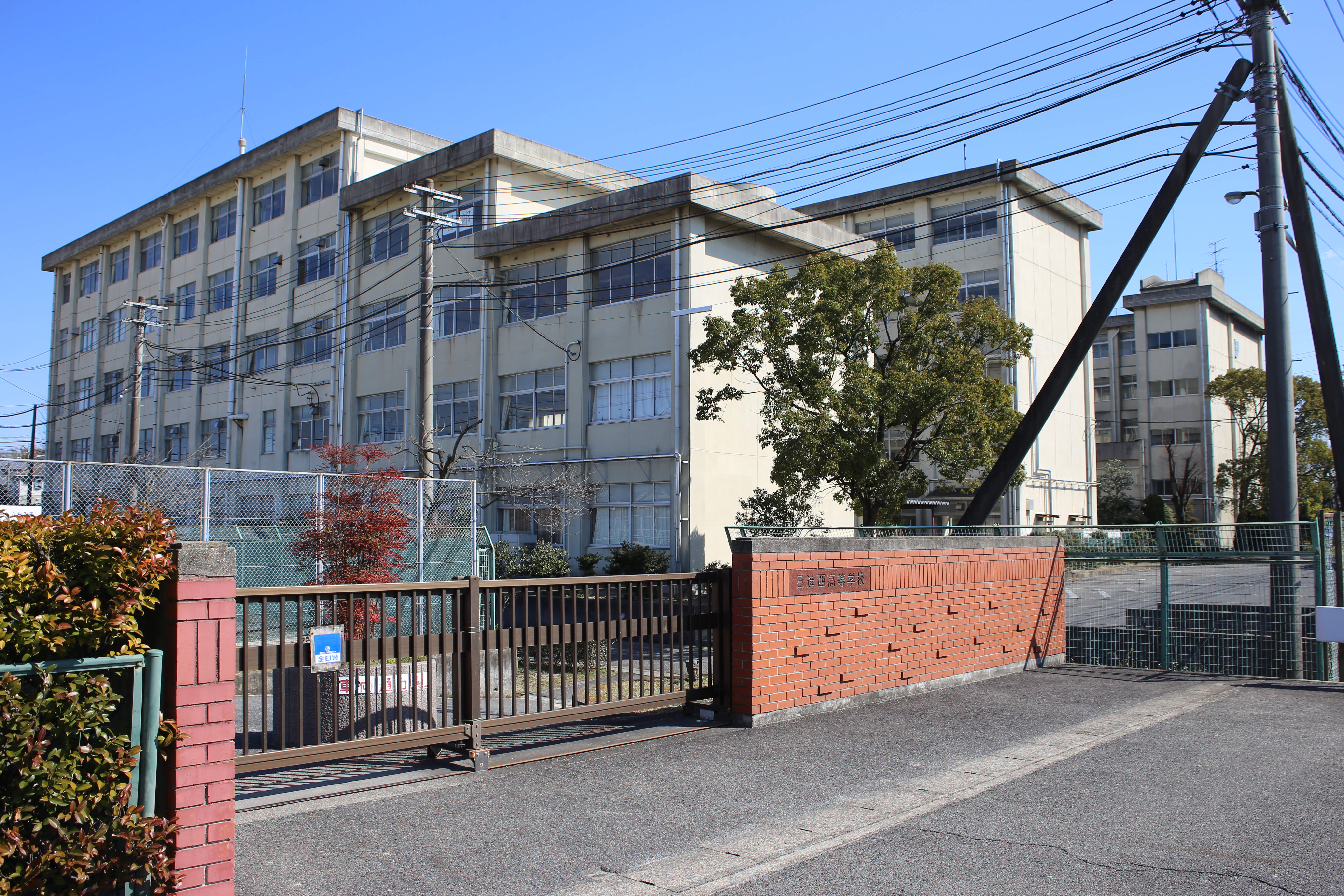 愛知県日進市の愛知県立日進西高等学校